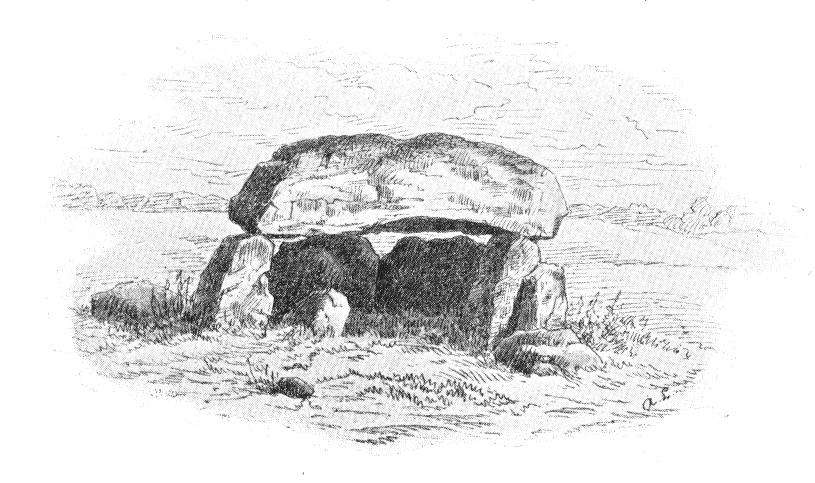 Opferstein im Birkenmoor (Dänischer Wohld) von Adolf Lohse.